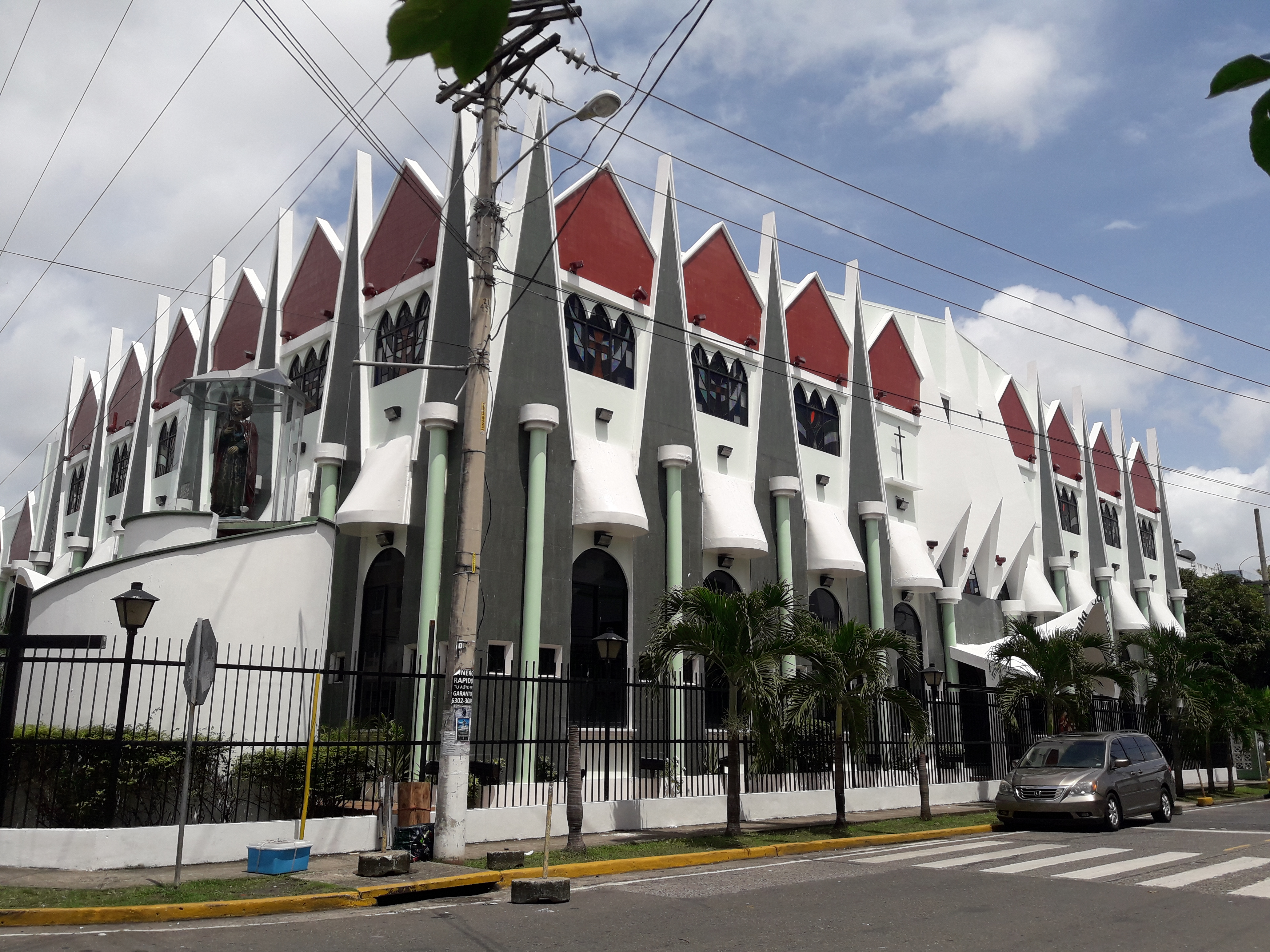 Parroquia San Judas Tadeo localizada en Juan Díaz, Panamá.